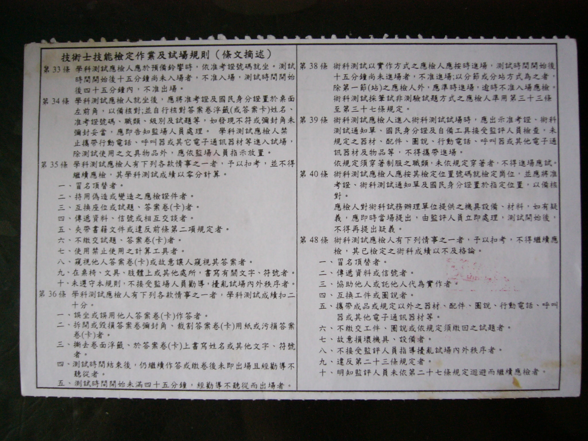 中華民國行政院勞工委員會製發的「九十四年度全國技術士技能檢定」乙級准考證背面。